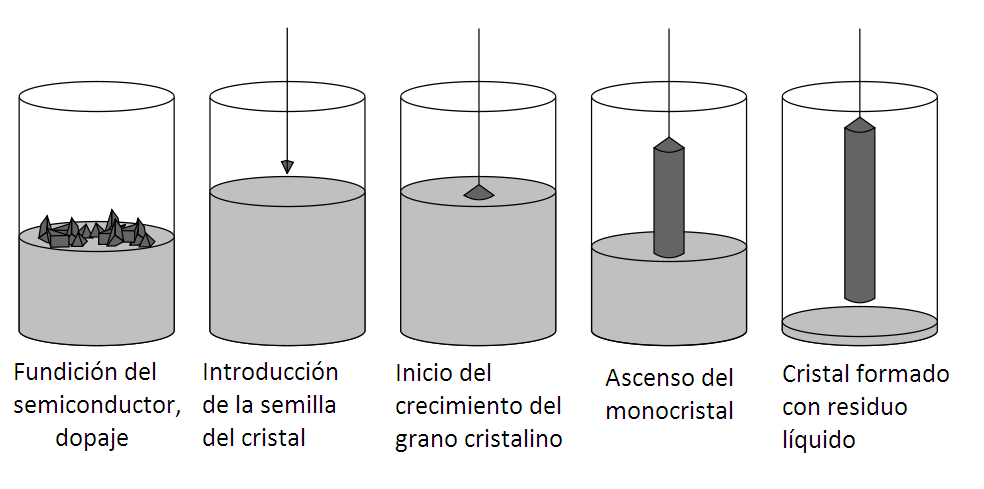 Descripción del proceso Chzochralski traducido